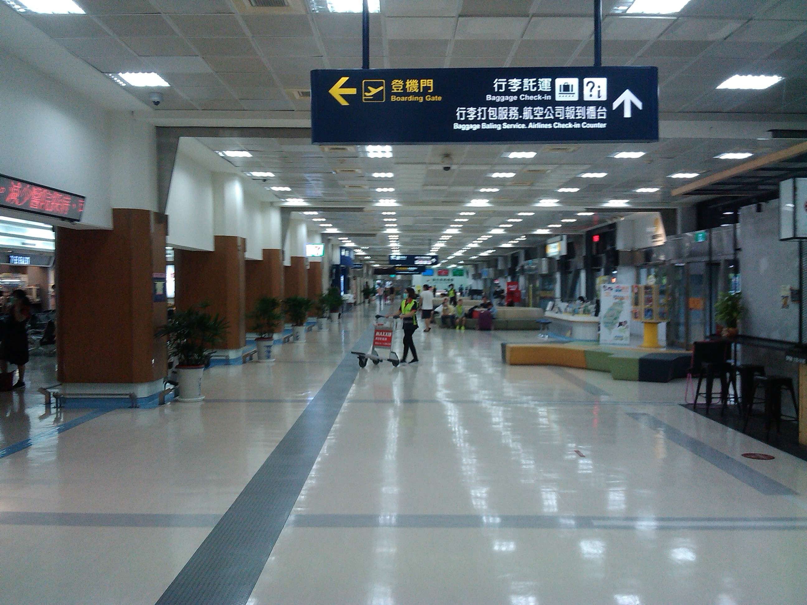 高雄小港機場